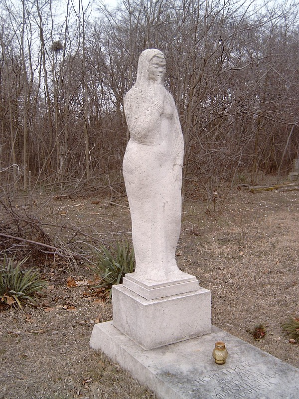 Hopp Ferenc sírja Budapesten. Kerepesi temető: 38-1-118.